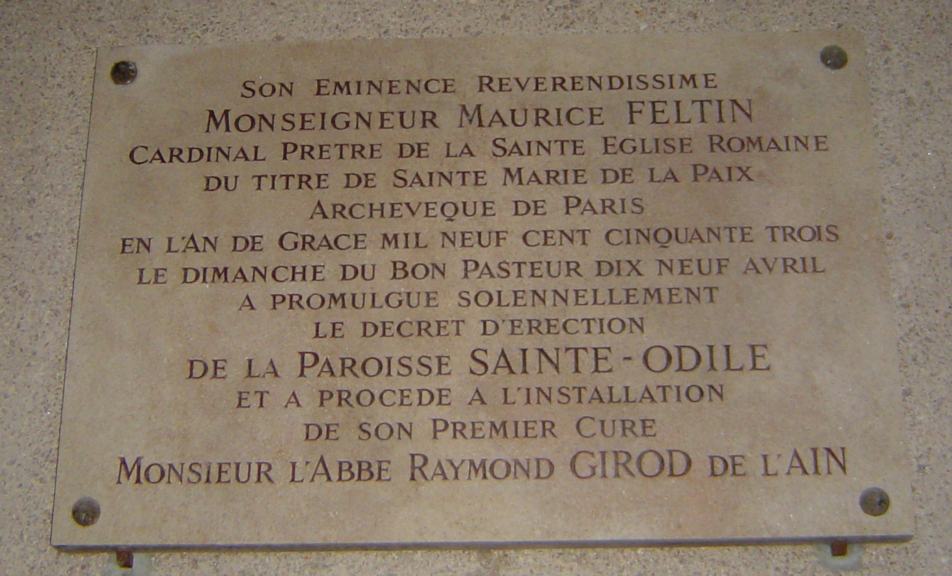 Photos prises à Paris